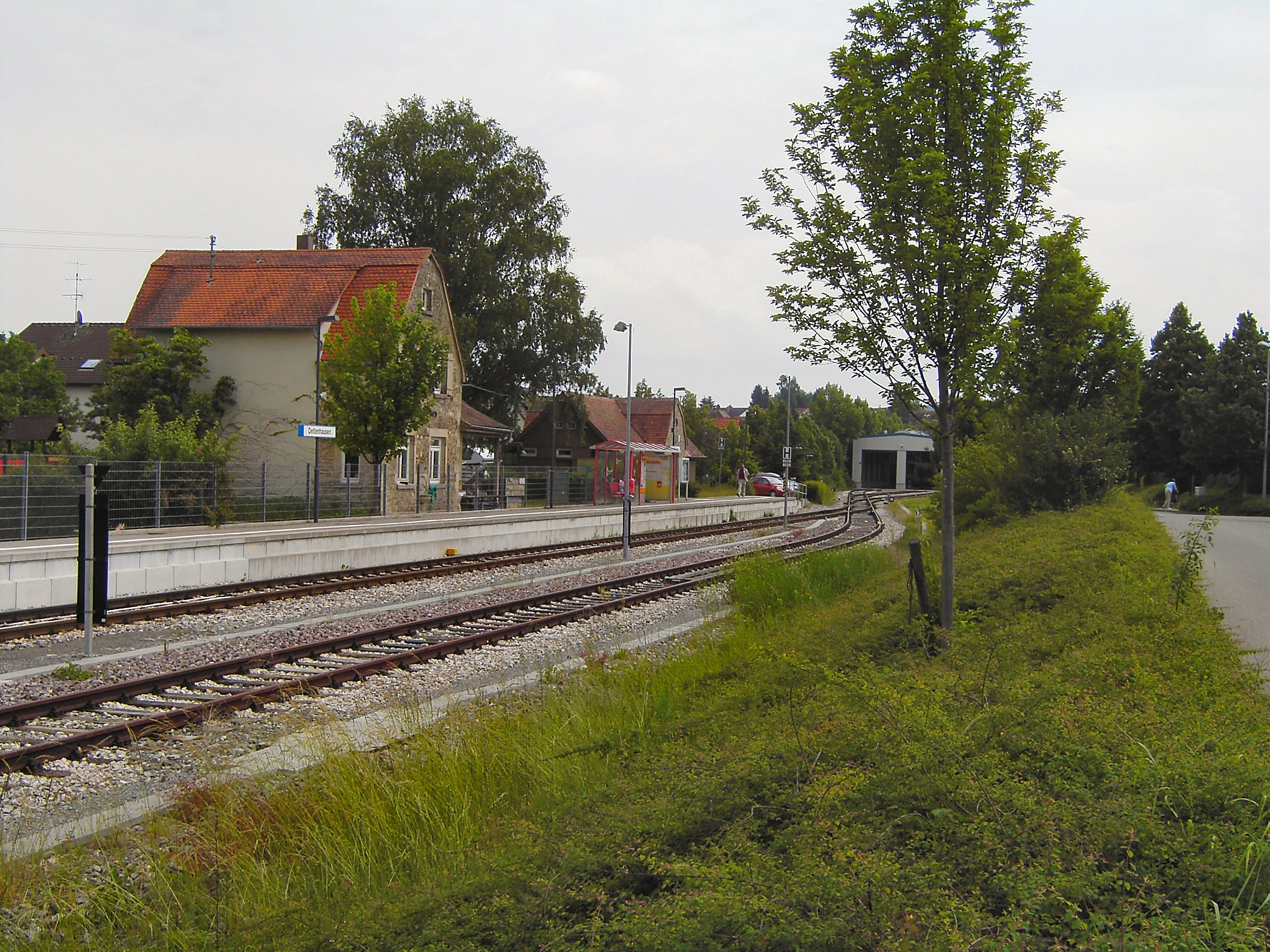 Bahnhof Dettenhausen, Endpunkt der Schönbuchbahn. Das alte Empfangsgebäude wurde restauriert, im Hintergrund die Wartungshalle. Vorne links sieht man, wie der Bahnsteig schon wenige Jahre nach der Reaktivierung wegen des gestiegenen Verkehrsaufkommens verlängert werden musste.